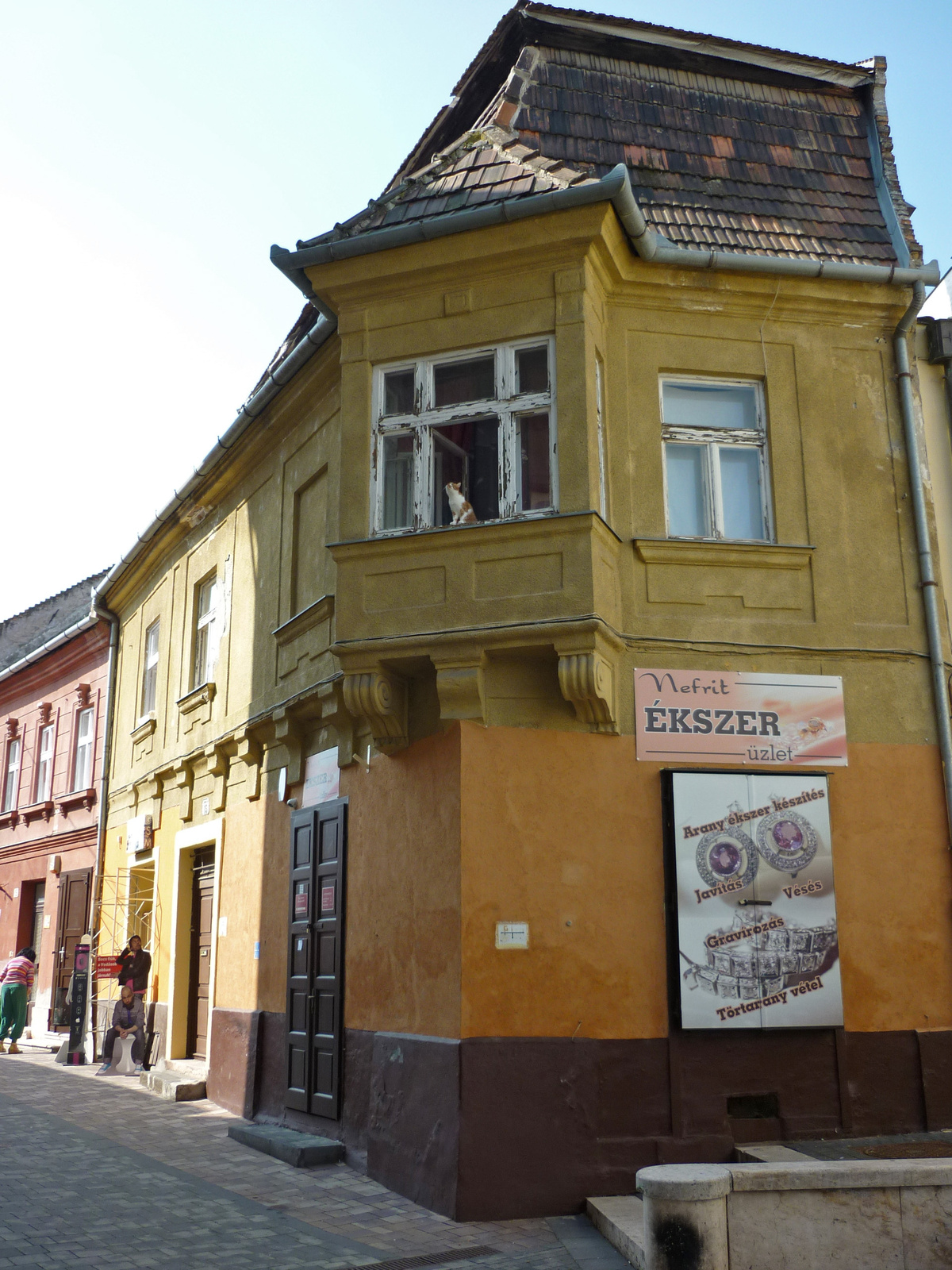 Lakóház (Győr, Kisfaludy u. 15 .)